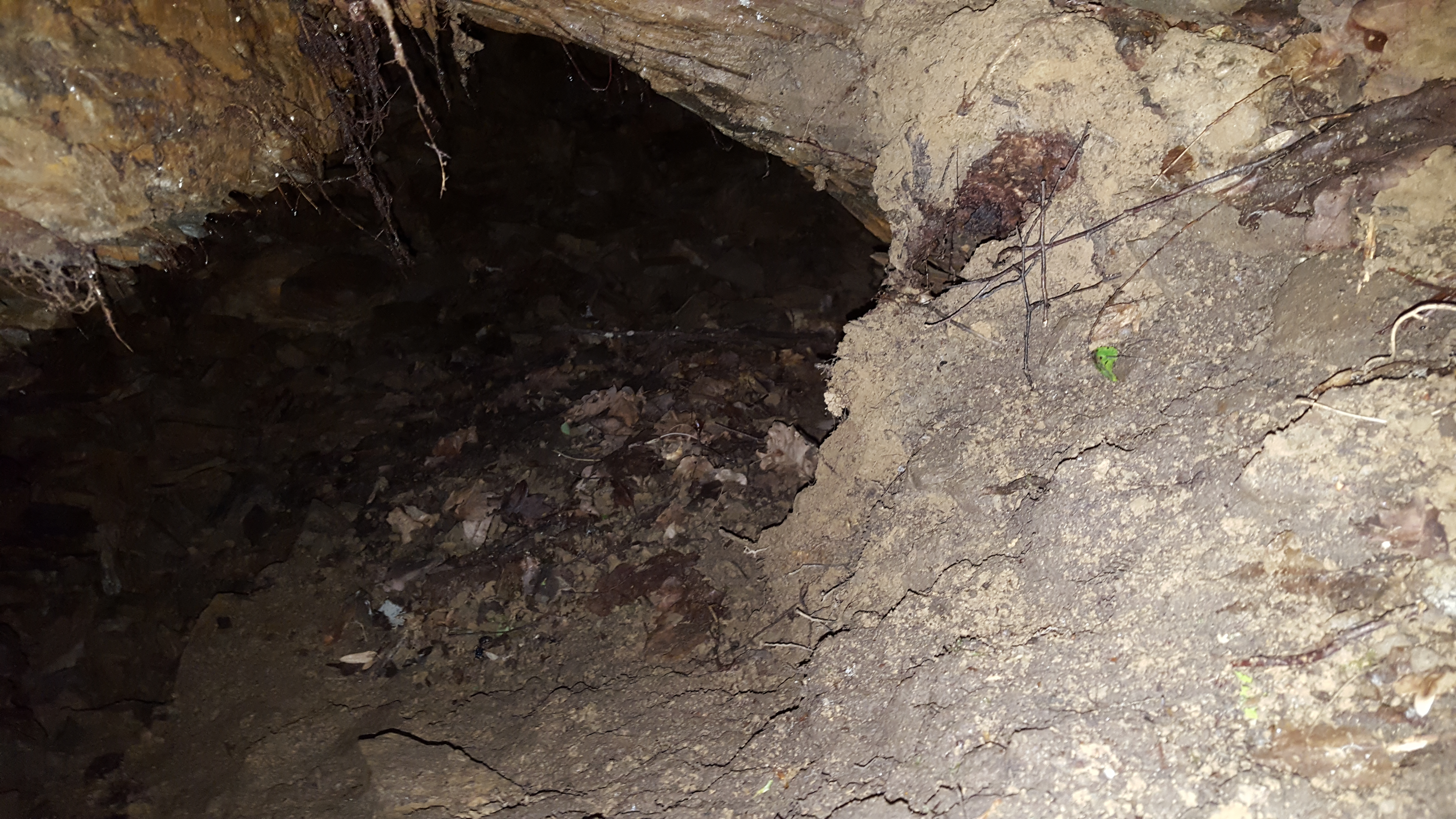 Blick in den unteren Stollen der Grube Sangberg bei Dillbrecht/Hessen